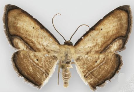 Campatonema tapantia male